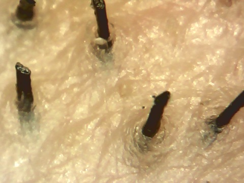 Particolare di peli di barba